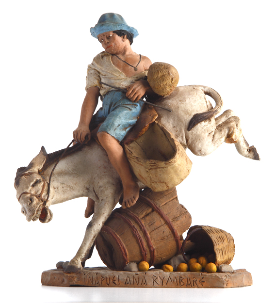 A representação de tipos populares é uma característica da obra de Marsal. O burro,importante meio de transporte de carga na zona rural na época, foi retratado em algumas de suas esculturas.